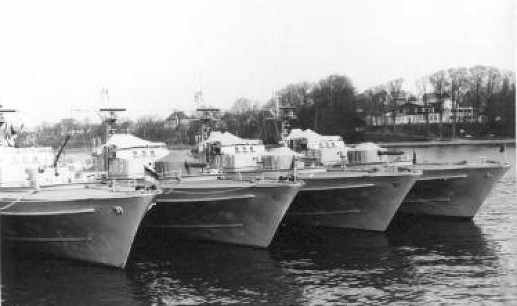 Deutsche Torpedo-Schnellboote der Jaguar-Klasse (140) des 5. Schnellbootgeschwaders im Hafen um 1960.